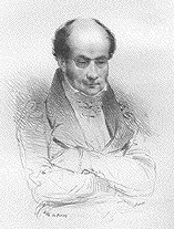 Chantelauze